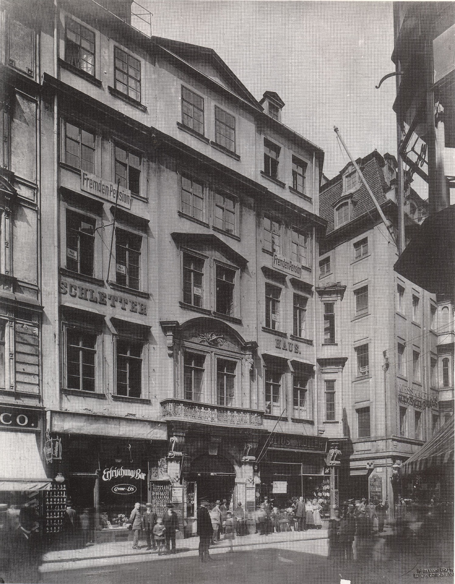 Das Schletterhaus in der Petersstraße um 1910. Das Haus gehörte im 16. Jahrhundert dem Leipziger Ratsherrn Cuntz Crell. Im Jahre 1836 kam das Haus in den Besitz des Leipziger Kaufmanns Adolf Heinrich Schletter (1793-1853) und wurde später nach ihm benannt. Das Gebäude wurde im Jahre 1920 abgebrochen und an dieser Stelle 1920/21 das Concentrahaus durch den Architekten Otto Droge erbaut. Andere Namen des Hauses: Zum großen Christoph Kobsches Haus Küstnersches Haus